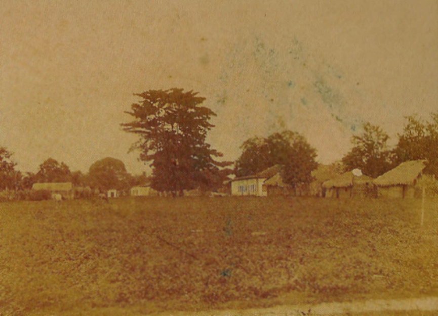 Praça da Igreja Matriz de São Bento, Maranhão.